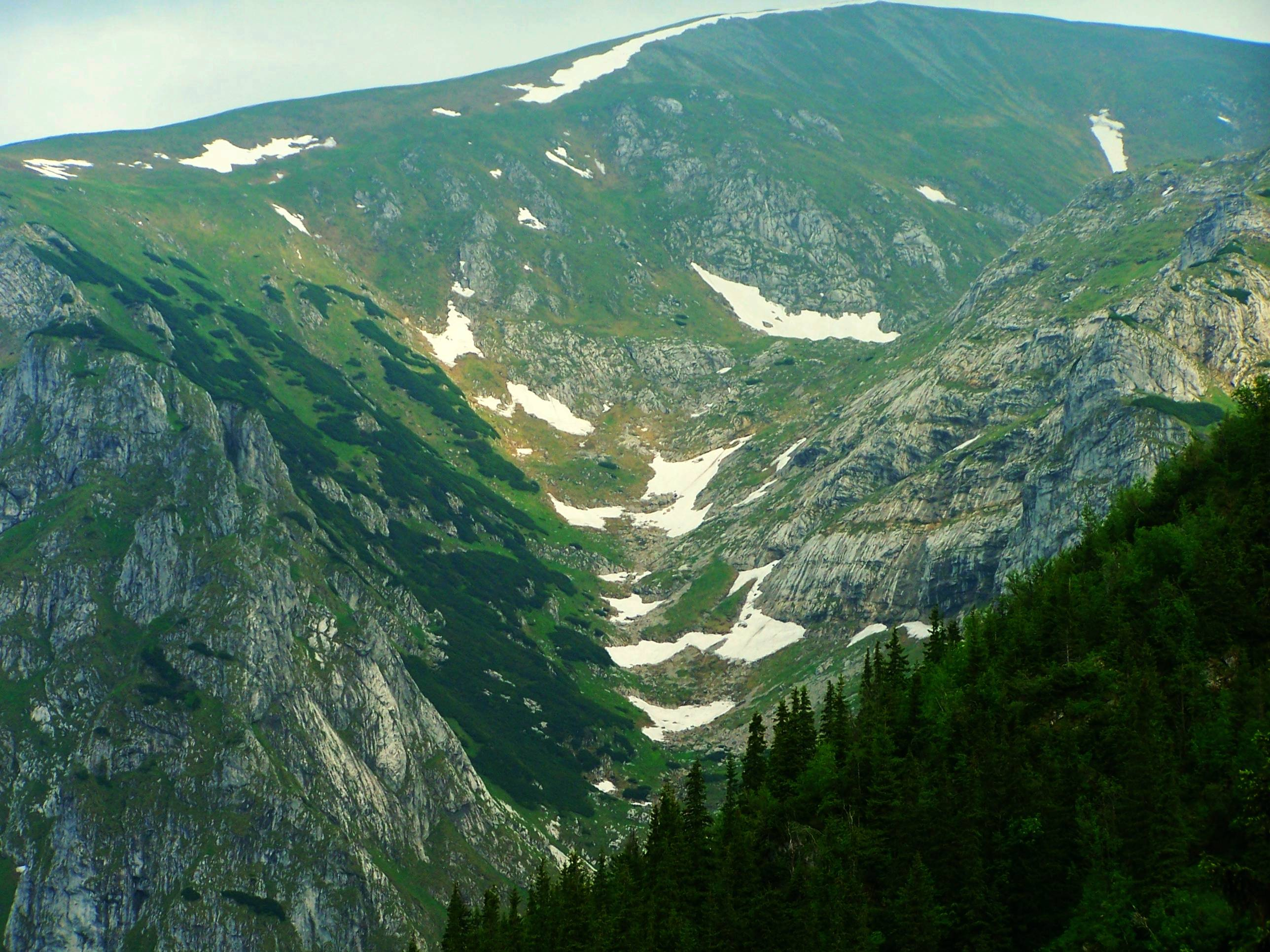 Dolina Litworowa (West Tatra Mountains. Widok z okolic Pieca